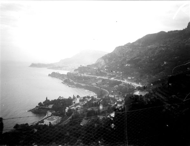 Fonds Trutat - Photographie ancienne Cote : TRU C 1772 Localisation : Fonds ancien (S 30) Original non communicable Titre : Monaco et Monte-Carlo vus depuis la corniche à Roquebrune-Cap-Martin, avril 1906 Auteur : Trutat, Eugène Rôle de l’auteur : Photographe Lieu de création : Roquebrune-Cap-martin (Alpes-Maritimes) Date de création : 1906 Mesures : : 9 x 12 cm Observations : Note manuscrite de Trutat : " Monaco, Monte Carlo vus depuis la corniche à Roquebrune, avril 1906, Goerz-Anschutz, Jougla ". Mot(s)-clé(s) : -- Corniche -- Falaise -- Route -- Versant rocheux -- Mer -- Vu d'en haut -- Montagne -- Roquebrune-Cap-martin (Alpes-Maritimes) -- Monaco (Principauté de) -- Méditerranée, Mer (France) -- Alpes-Maritimes (Provence-Alpes-Côte d'Azur) -- Provence-Alpes-Côte d'Azur (France) -- 20e siècle, 1e quart Médium : Photographies -- Négatifs sur plaque de verre -- Noir et blanc -- Jougla-Lumière -- Paysages de montagne -- Goerz-Anschutz Bibliothèque de Toulouse. Domaine public